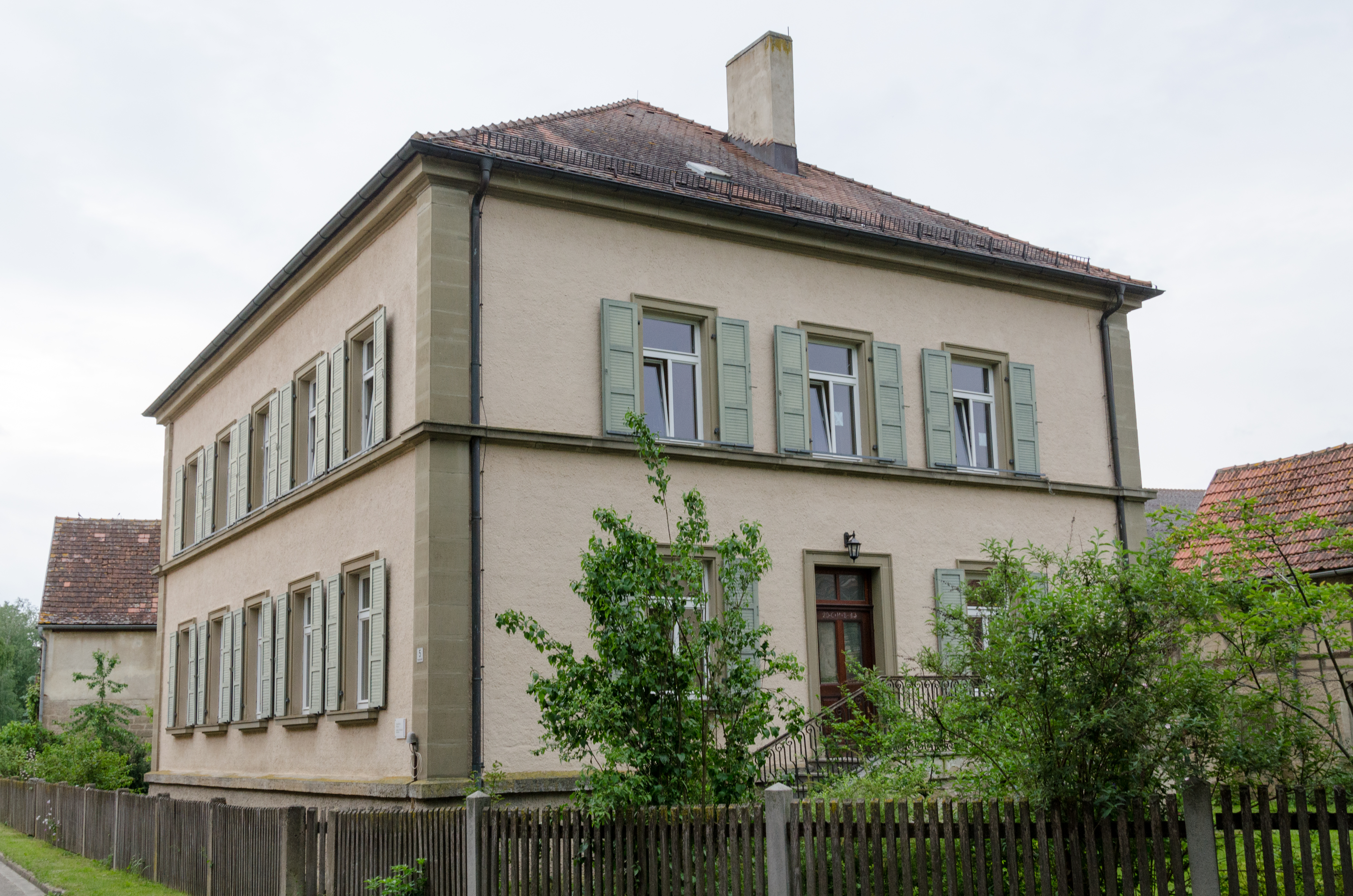 Burgbernheim, Buchheim, Hauptstraße 5